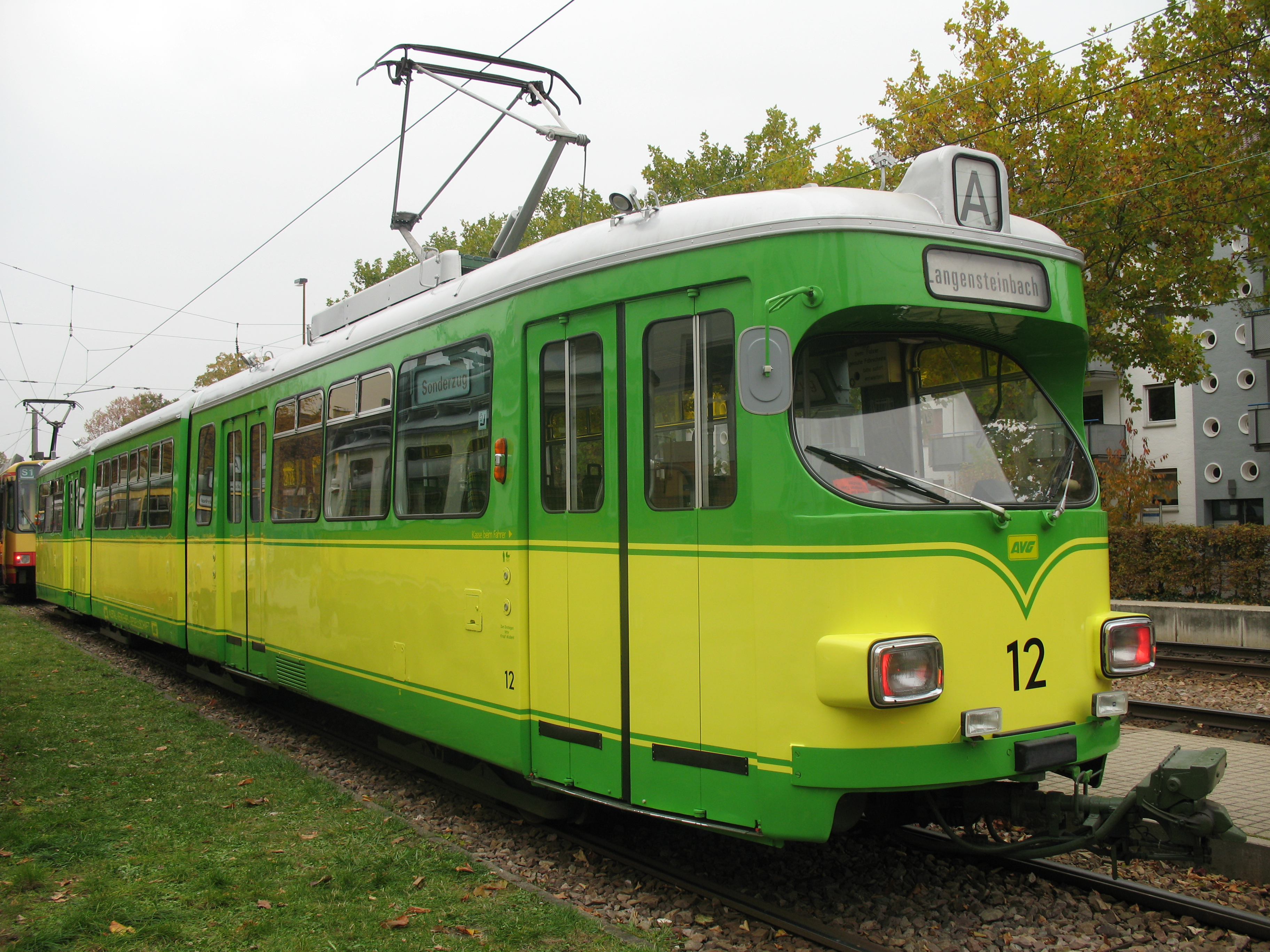 Tw 12 in Ettlingen Stadt